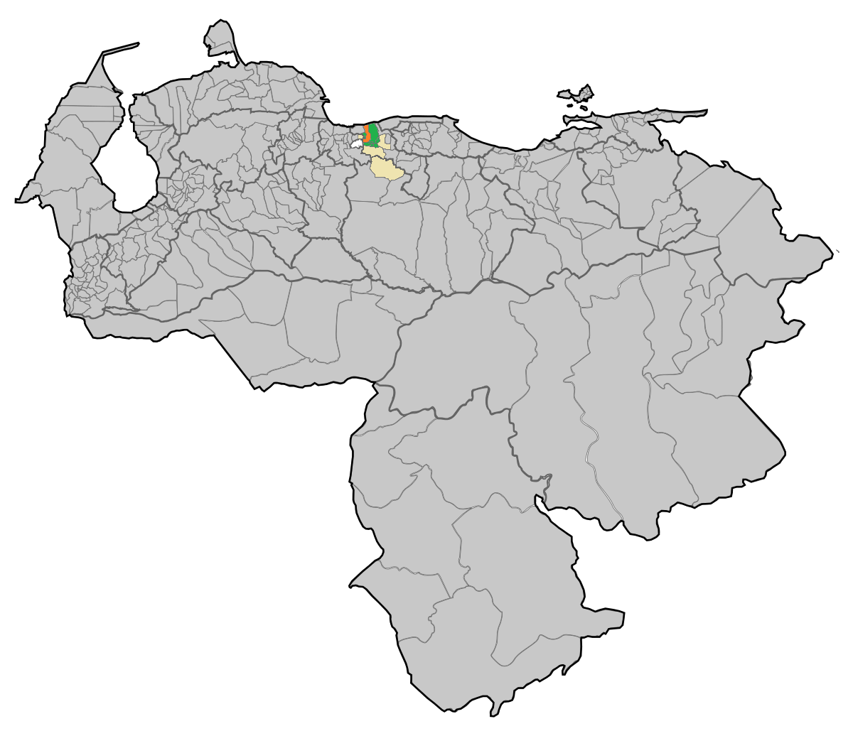 Def AM C